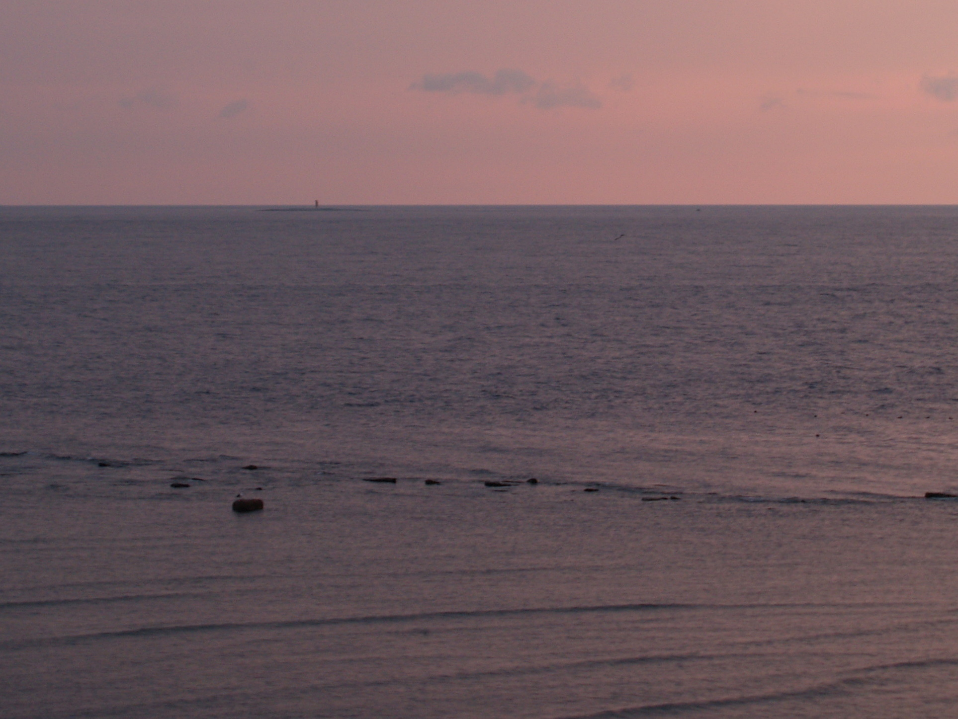 Krassi saar vaadatuna Suur-Pakri tulepaagist.